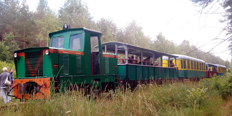 Ełcka Kolej Wąskotorowa